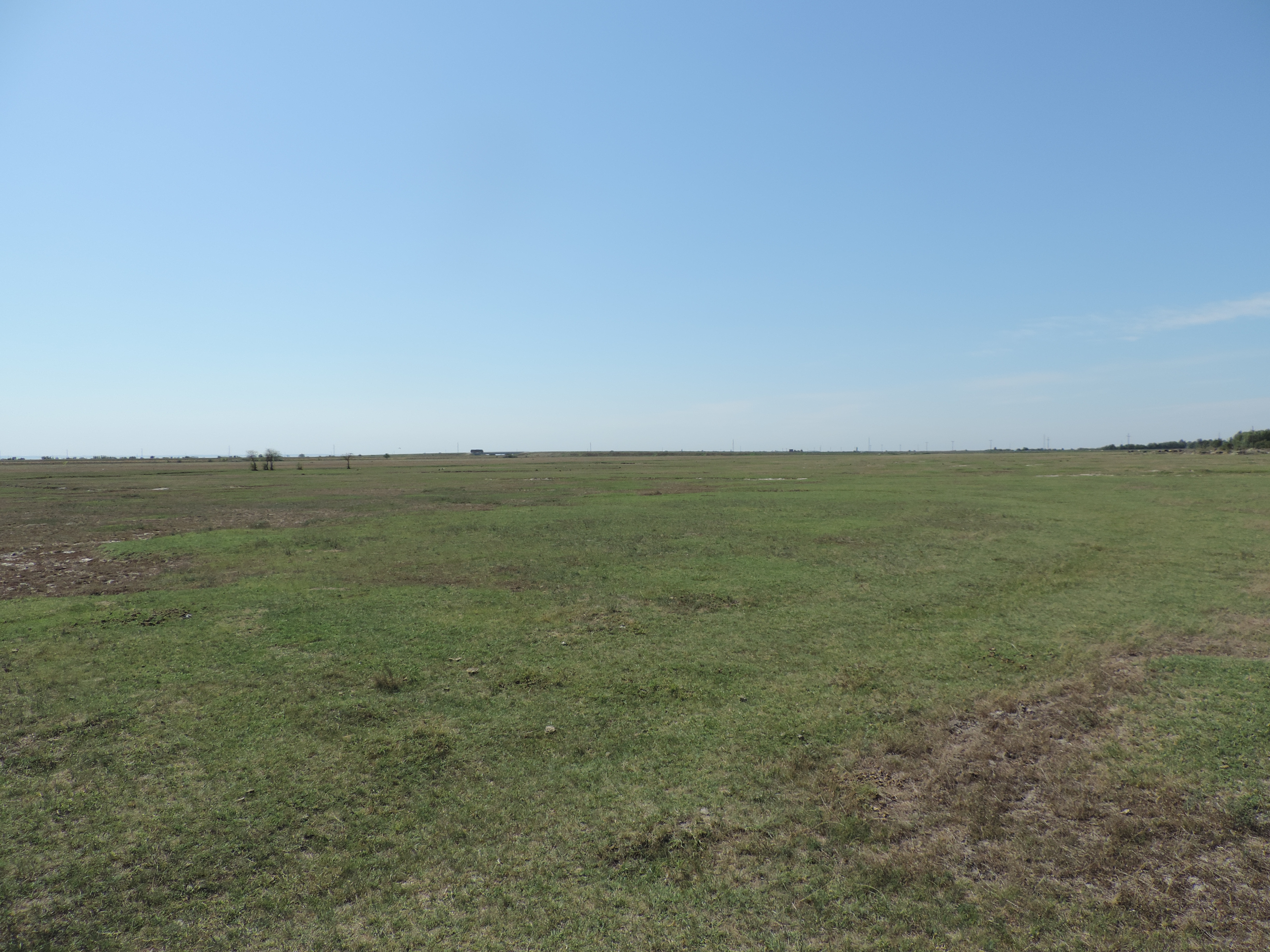 Slatinsko-stepski pašnjak u okolini sela Margita